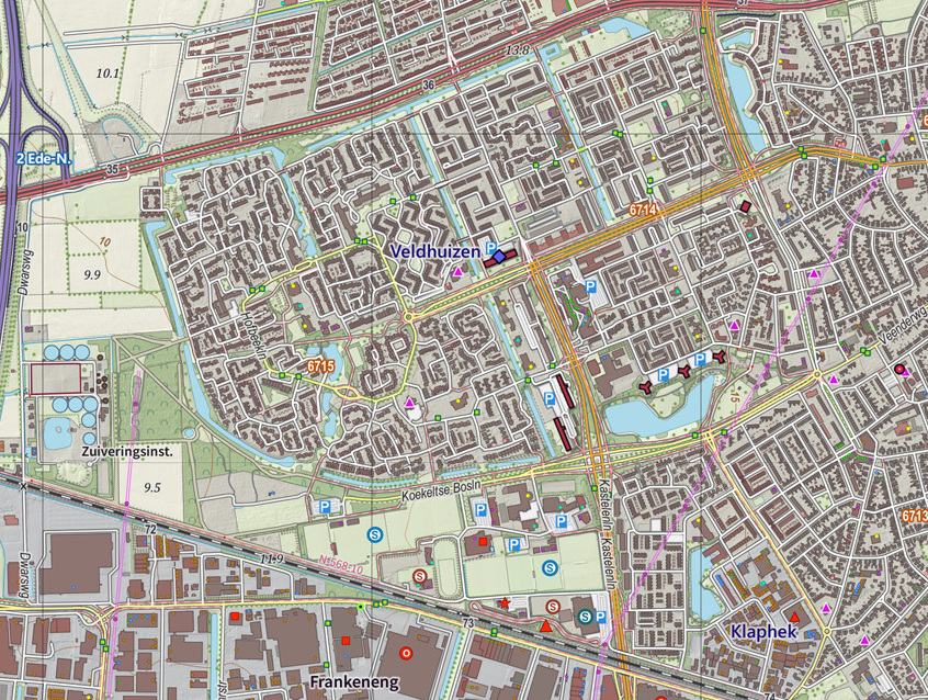 Topografische kaart van Ede (woonplaats). Resolutie: 300 pixels/km. Kaartbeeld samengesteld uit de open geodata van de Top10NL en Top25namen (Basisregistratie Topografie, Kadaster), Creative Commons BY licentie. Gebouwvlakken uit open geodata BAG extract. Wegen uit de OpenStreetMap, OpenStreetMap community. Reliëfschaduw uit de Actuele Hoogtekaart AHN2. Samenstelling en kleurenschema: Jan-Willem van Aalst, met QGIS2. Zie ook de Legenda.